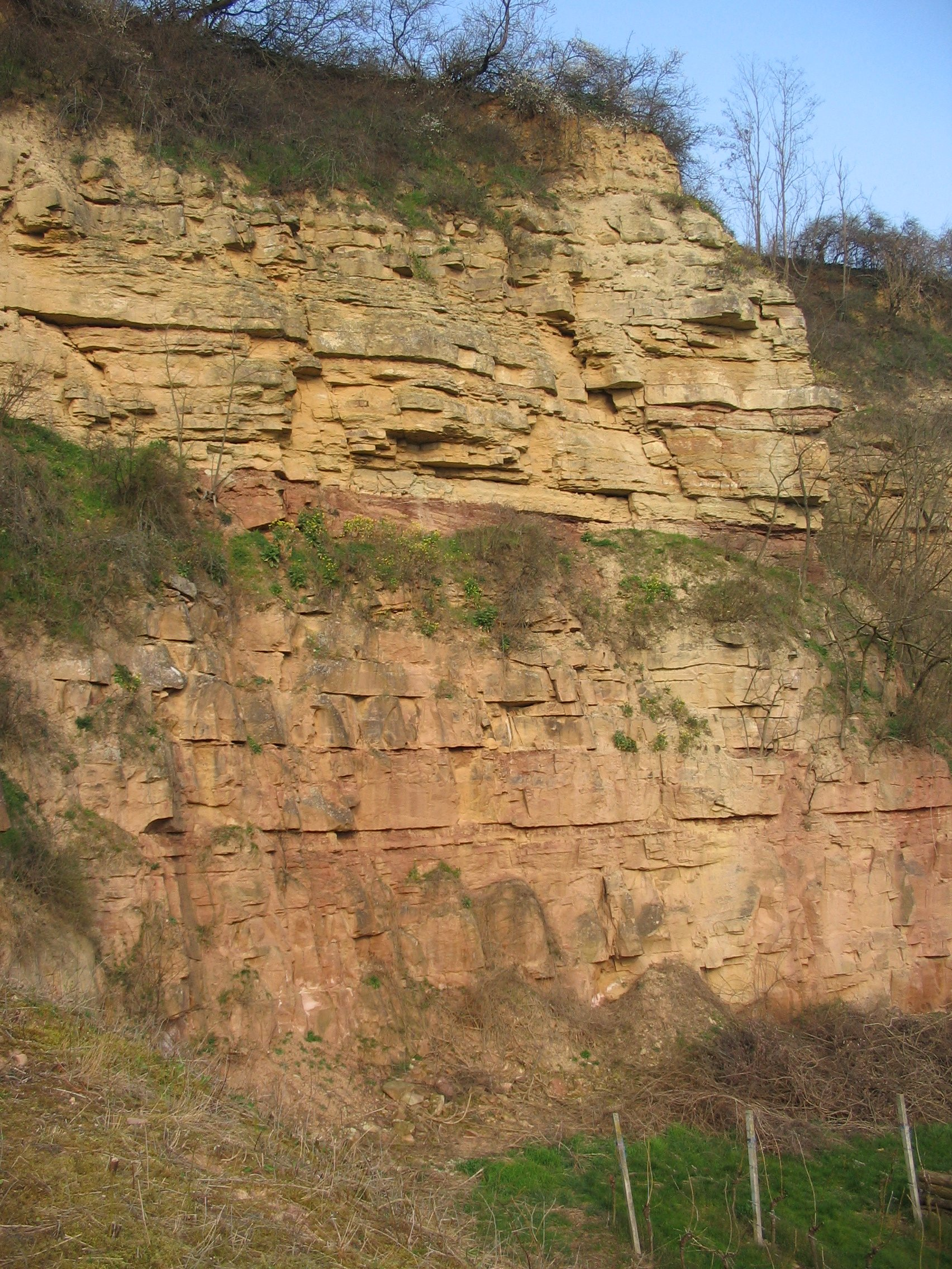 ancienne carrière royale (grès) à Soultz-les-Bains dans le Bas-Rhin. Mis en exploitation au XVIIe siècle par Vauban pour la construction de la citadelle de Strasbourg.